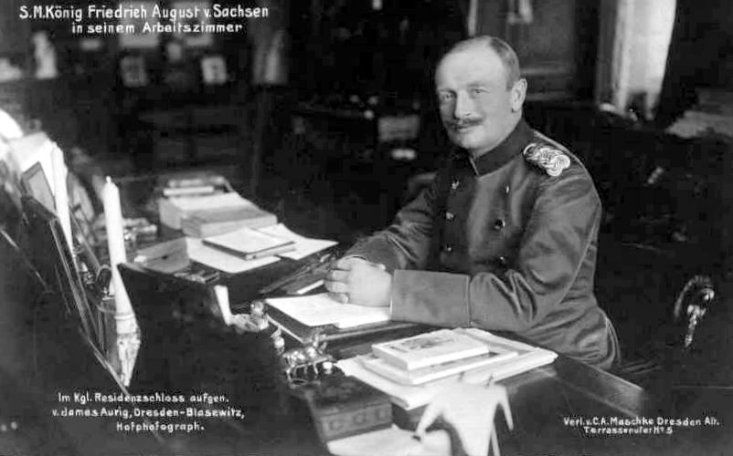 Seine Majestät König Friedrich August [III.] von Sachsen in seinem Arbeitszimmer.